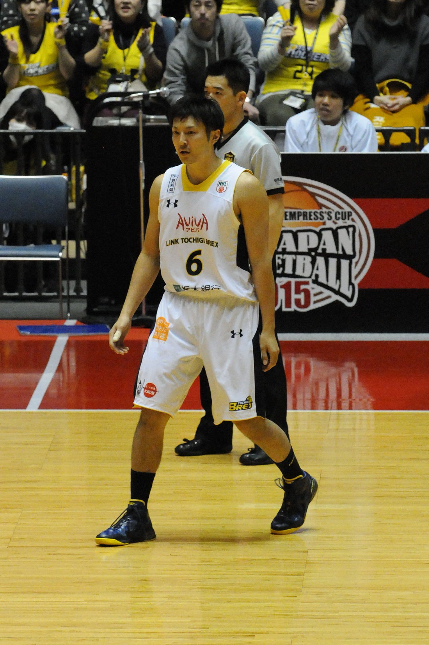 リンク栃木ブレックス、小林大祐選手。代々木第一体育館で。